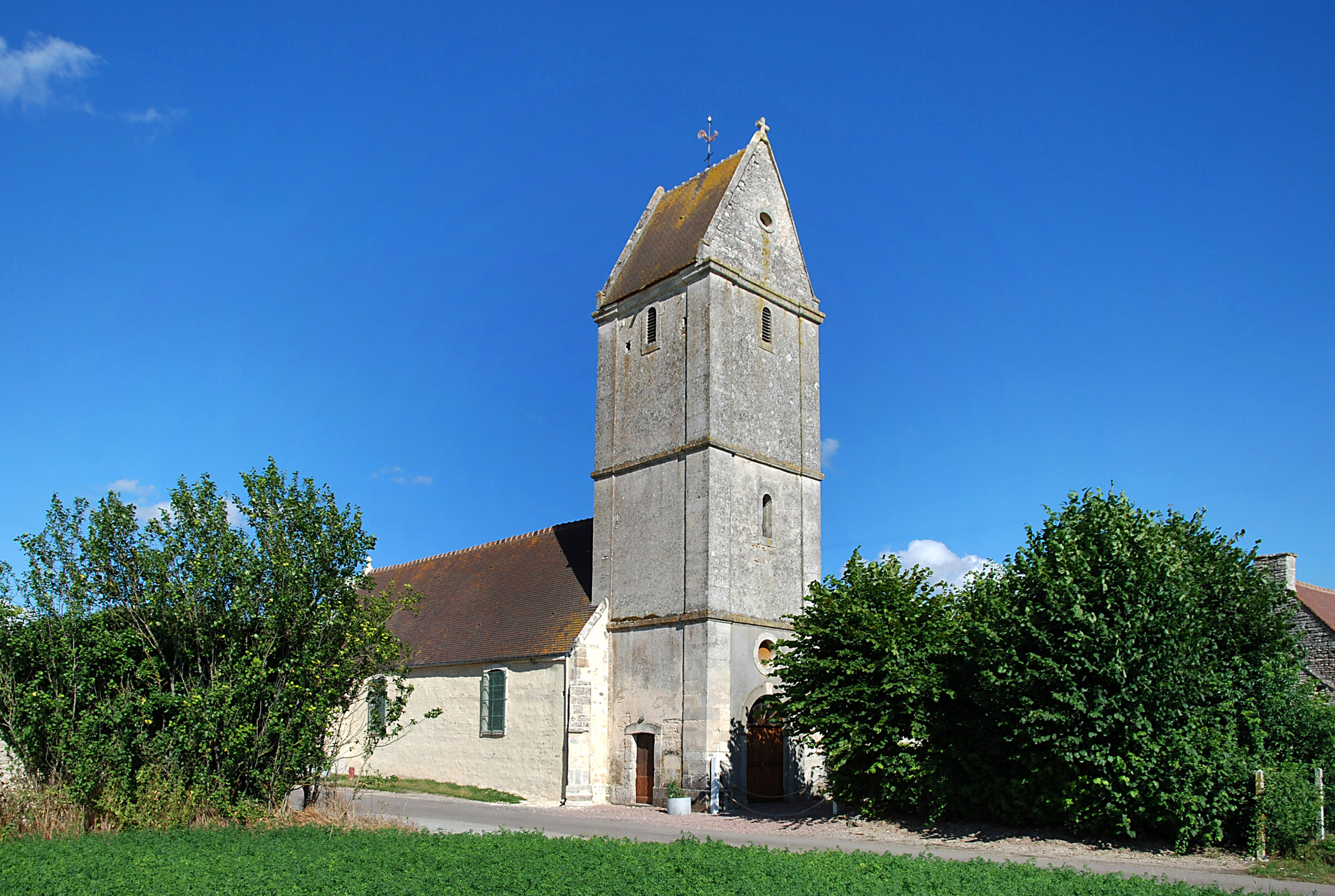 Le Marais-la-Chapelle (Calvados)